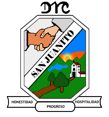 Escudo Oficial Del Municipio De San Juanito